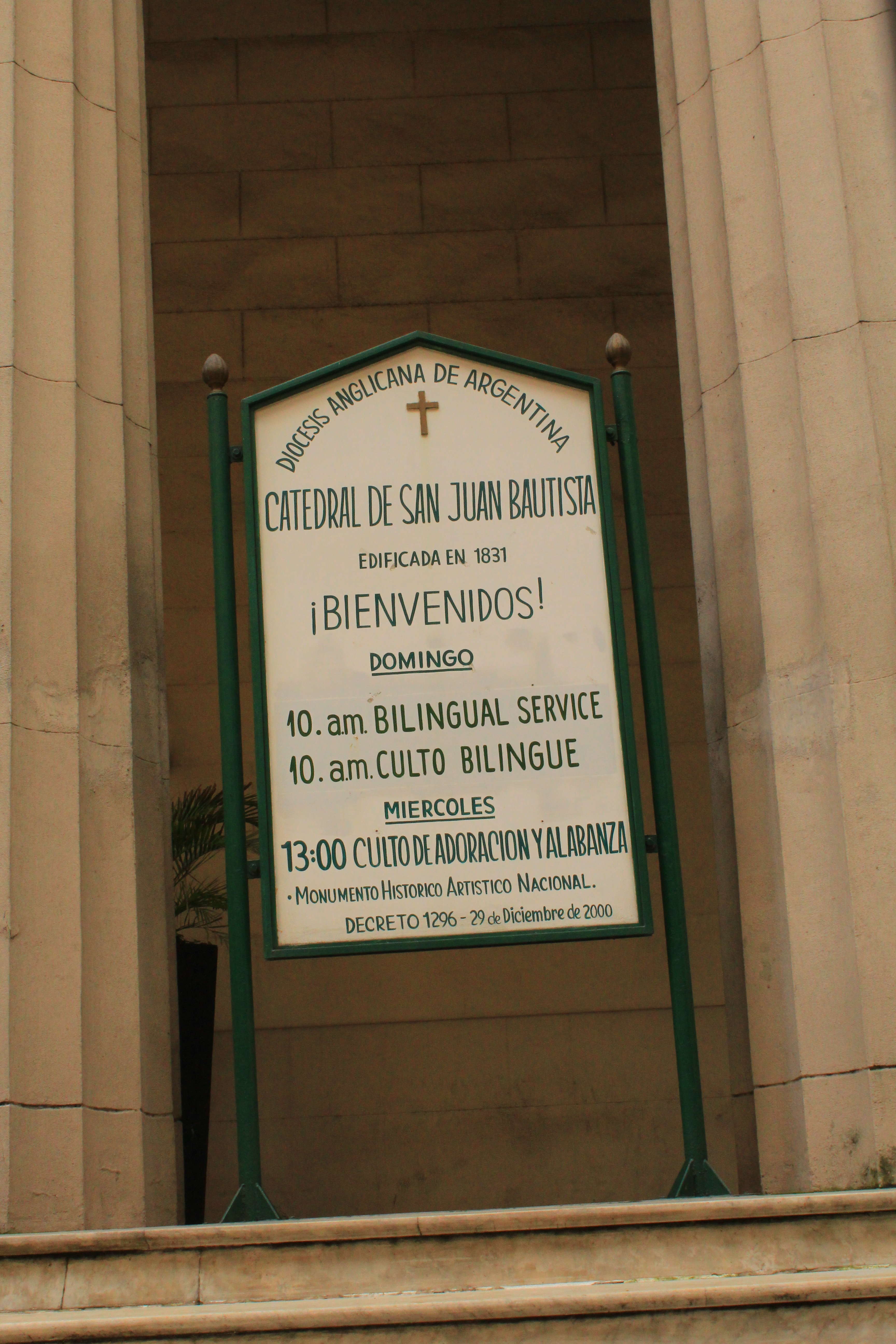 Catedral Anglicana de San Juan Bautista